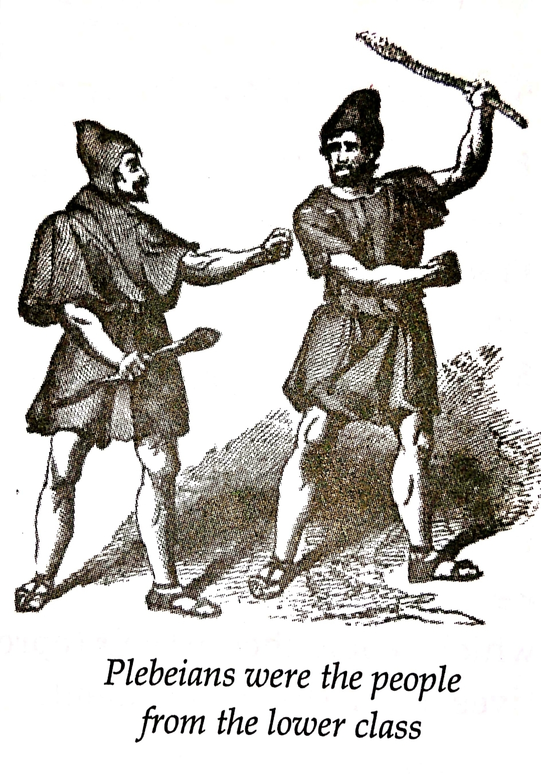 This work is in the public domain in its country of origin and other countries and areas where the copyright term is the author's life plus 70 years or fewer. You must also include a United States public domain tag to indicate why this work is in the public domain in the United States. Note that a few countries have copyright terms longer than 70 years: Mexico has 100 years, Jamaica has 95 years, Colombia has 80 years, and Guatemala and Samoa have 75 years. This image may not be in the public domain in these countries, which moreover do not implement the rule of the shorter term. Côte d'Ivoire has a general copyright term of 99 years and Honduras has 75 years, but they do implement the rule of the shorter term. Copyright may extend on works created by French who died for France in World War II (more information), Russians who served in the Eastern Front of World War II (known as the Great Patriotic War in Russia) and posthumously rehabilitated victims of Soviet repressions (more information). This file has been identified as being free of known restrictions under copyright law, including all related and neighboring rights.